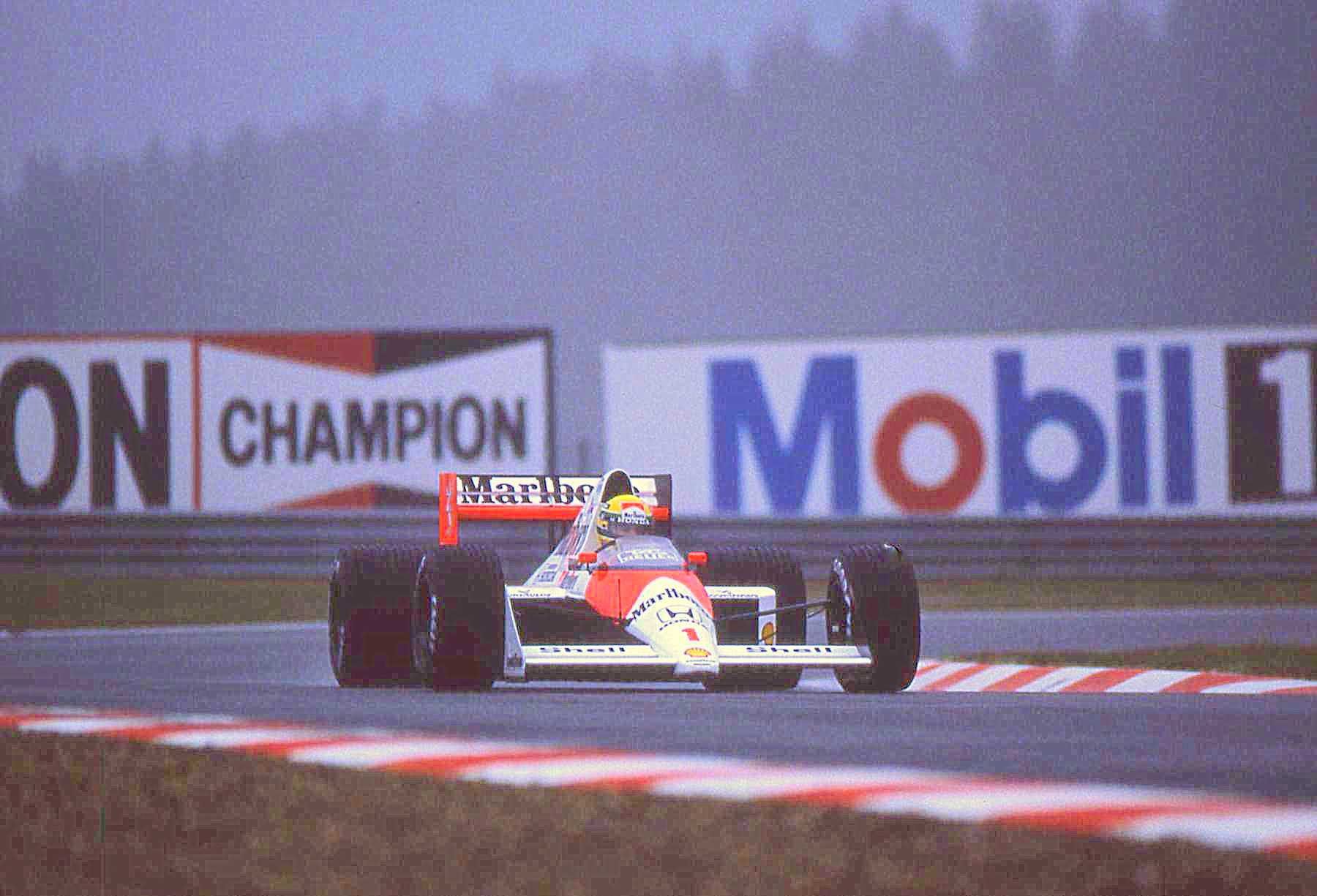 Ayrton Senna - McLaren-Honda. Scan diapo argentique.